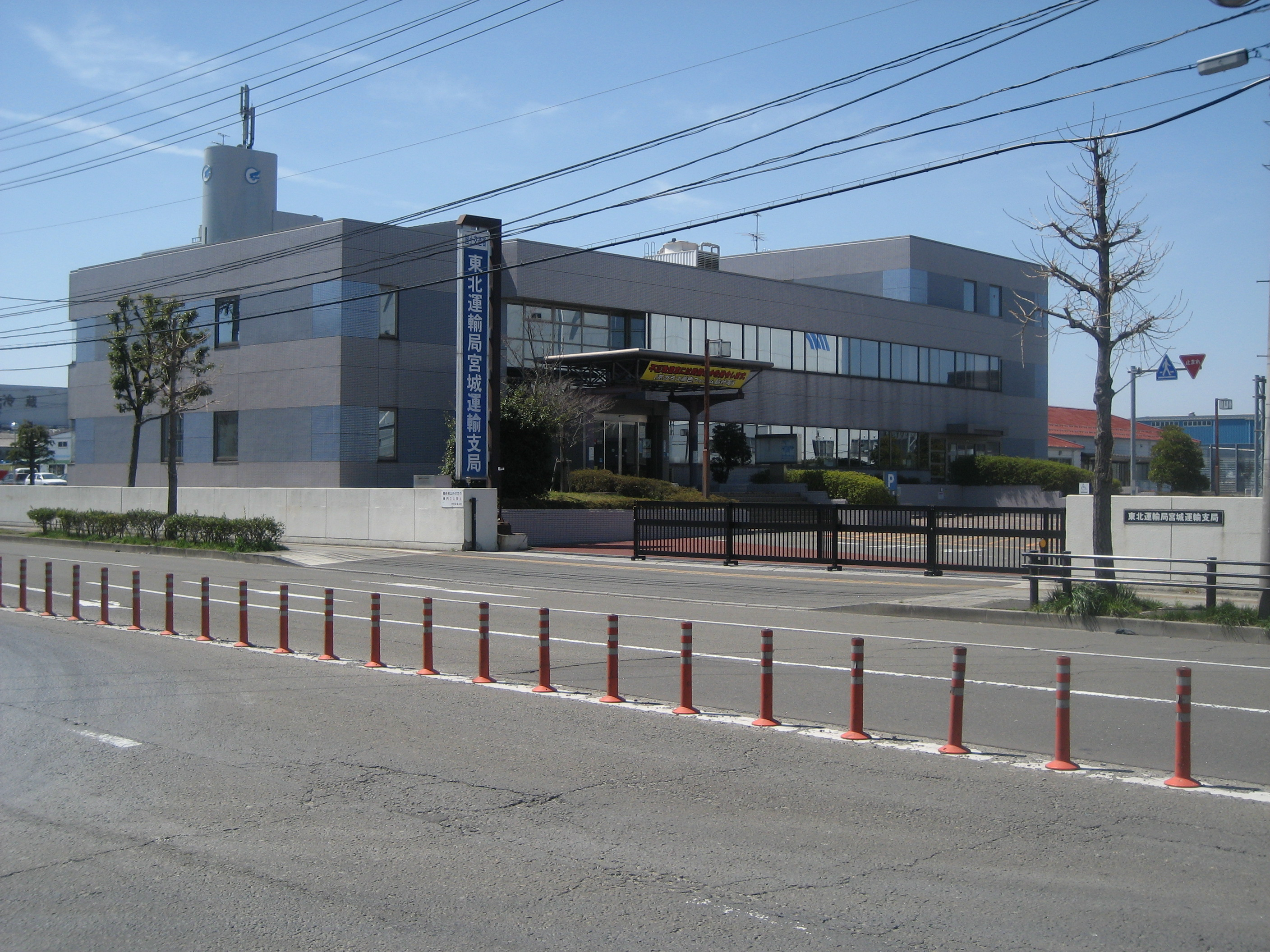 宮城運輸支局庁舎（正門付近を撮影）